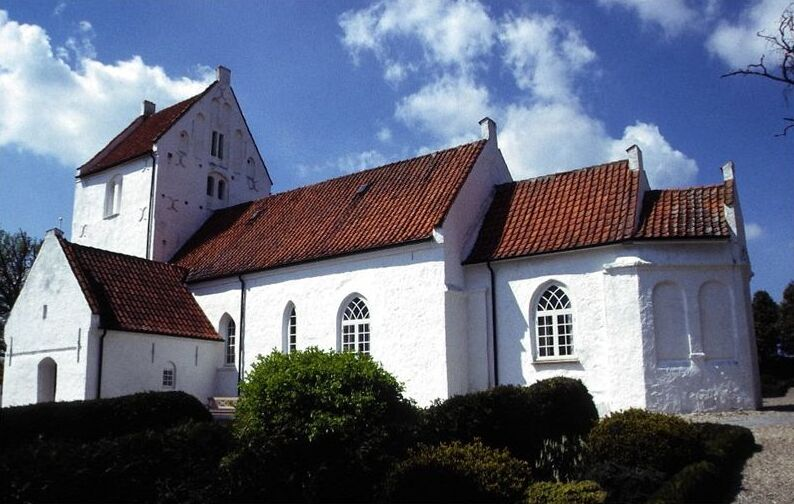 Vallekilde Kirke i Danmark. Vallekilde kirke